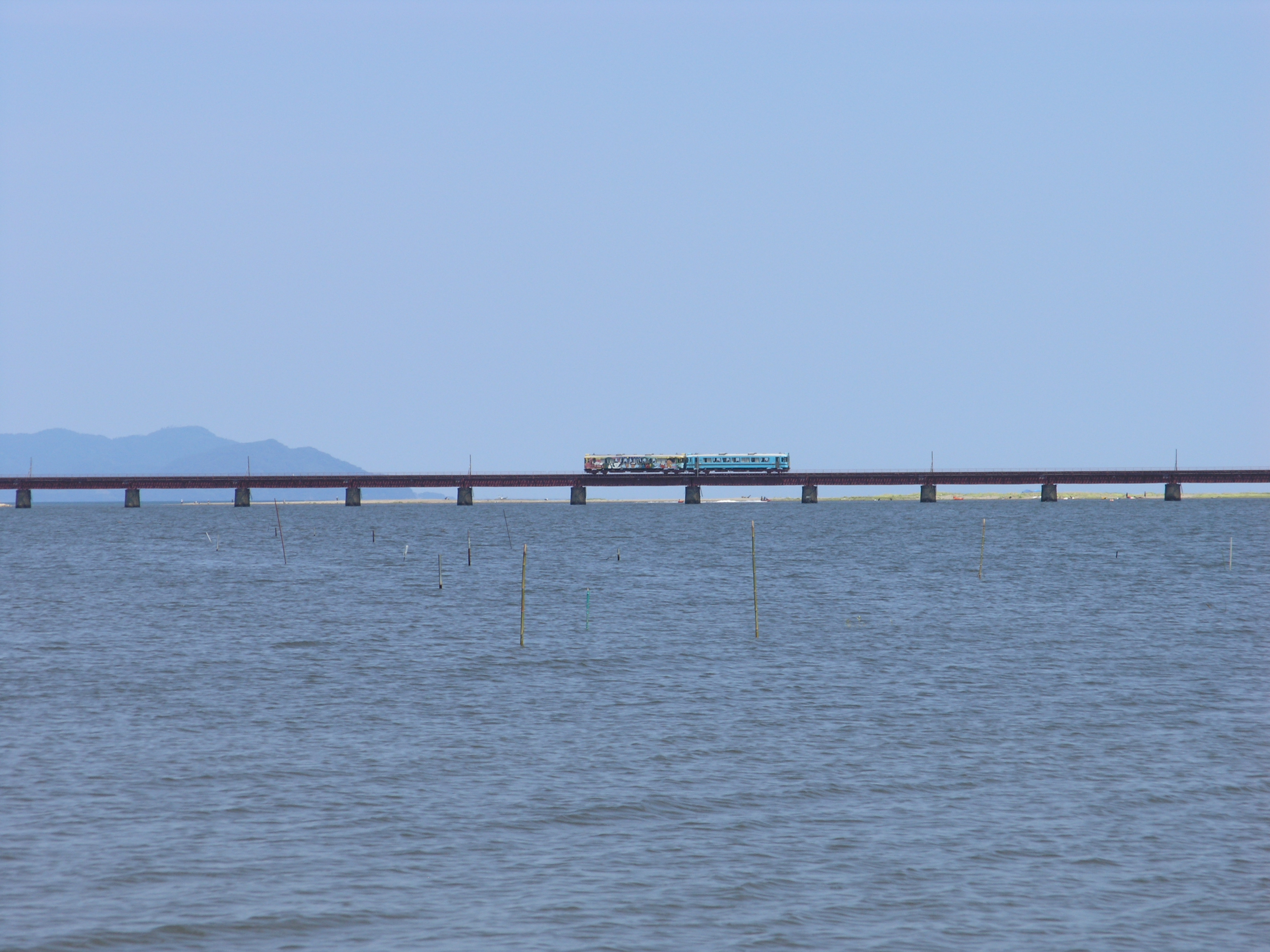 北近畿タンゴ鉄道 由良川橋りょうを渡る KTR700・800形気動車「TANGO悠遊号」 2008年8月撮影。 機材：C8080WZ 撮影者：Kansai explorer